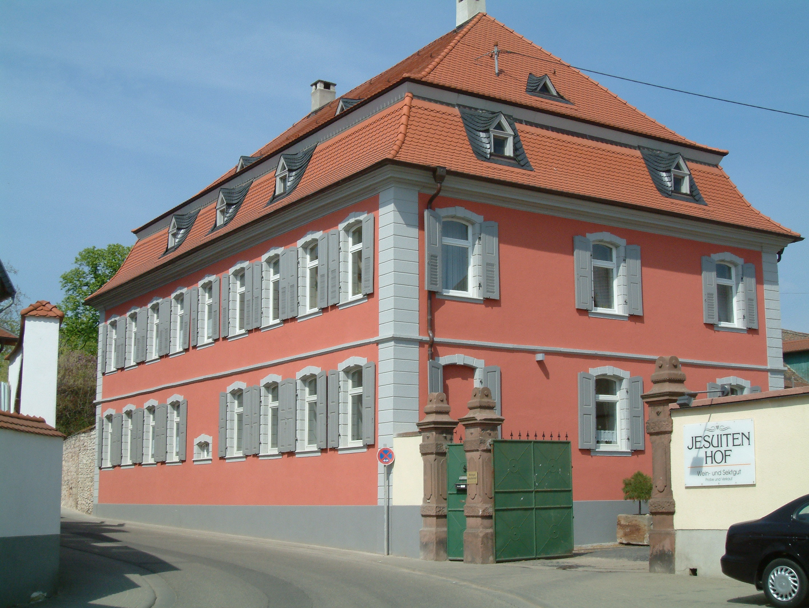 Quadtsches Schloss zu Dirmstein, selbst fotografiert am 2006-04-24 und freigegeben durch Benutzer:Mundartpoet Anmerkung: Der Name "Quadt" ist in der Ortschronik fälschlich "Quad" geschrieben.